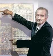 fotografie předmětu osoby článku